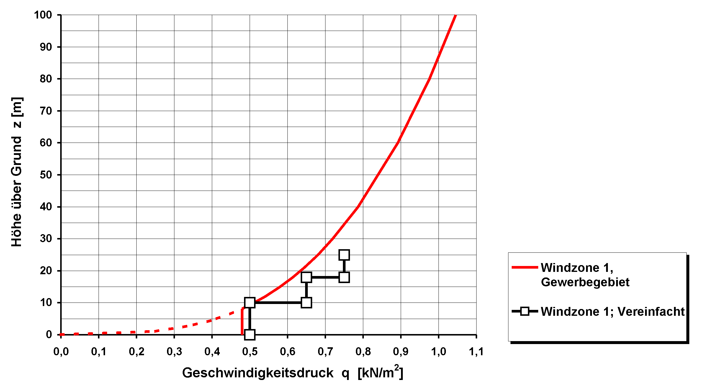 Windprofil nach DIN 1055-4: Verteilung des Geschwindigkeitsdrucks über die Höhe bis 100 m